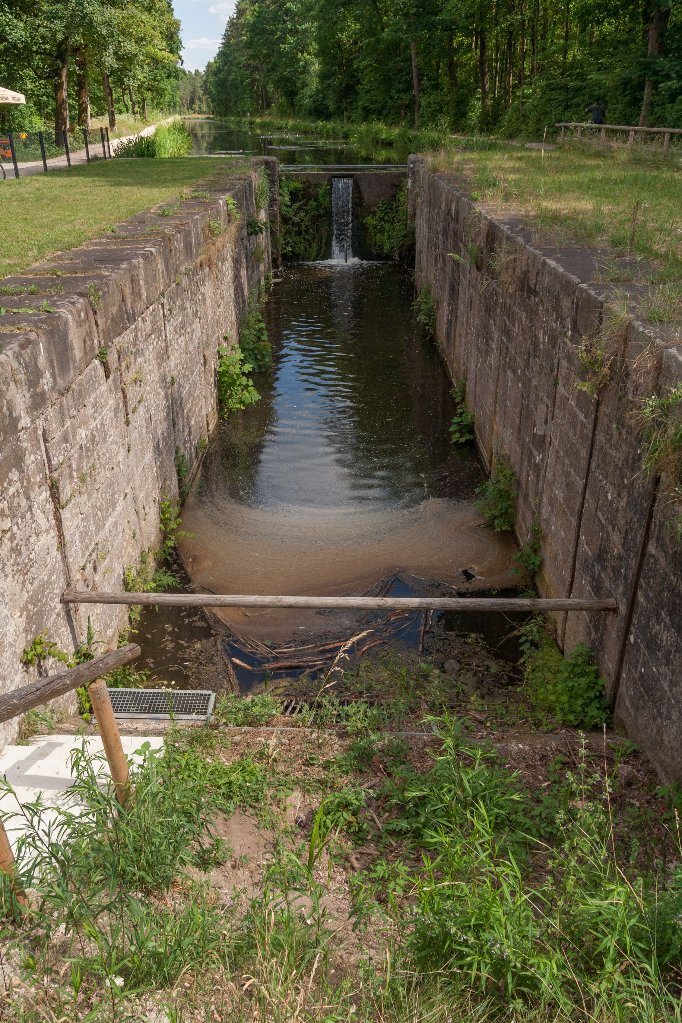 Ludwig-Donau-Main-Kanal, Nürnberg, Schleuse 71